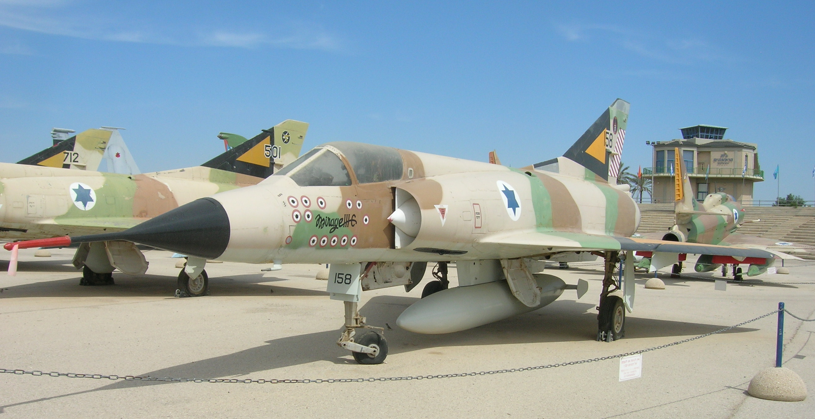 Dassault Mirage IIICJ